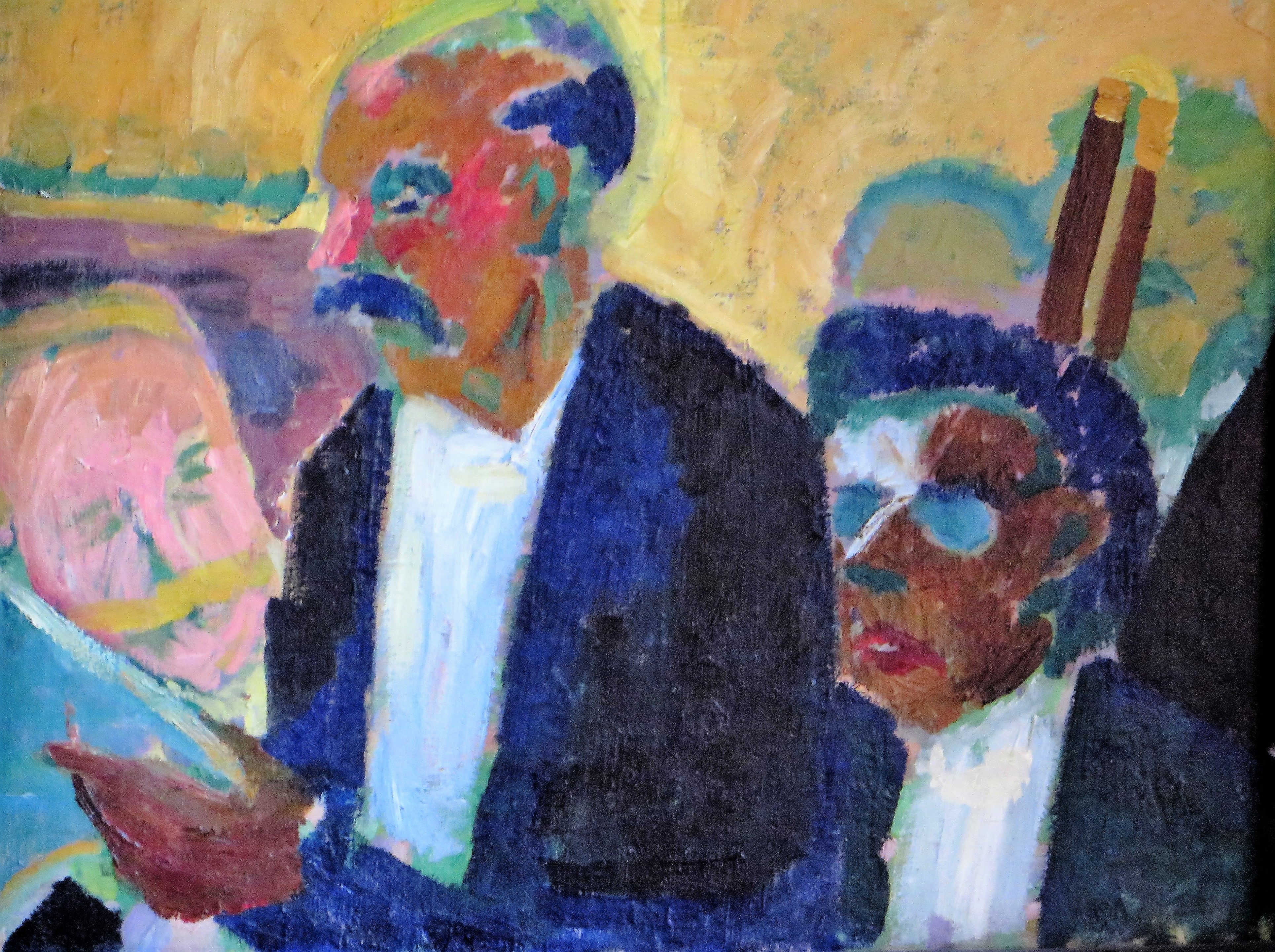 Denkmalgeschützte Jugendstilvilla Hohenhof in Hagen, Stirnband 10. Gemälde „Der Sänger“ (mit Musikdirektor Laugs) im Speisezimmer der Villa. Öl auf Leinwand (1912), von dem in Hagen geborenen expressionistischen Maler Walther Bötticher (1885–1916). Das Gemälde entstand anlässlich des neu gegründeten Philharmonischen Orchesters und Theaters in Hagen.